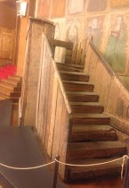 Падуанский университет - Кафедра Галилея